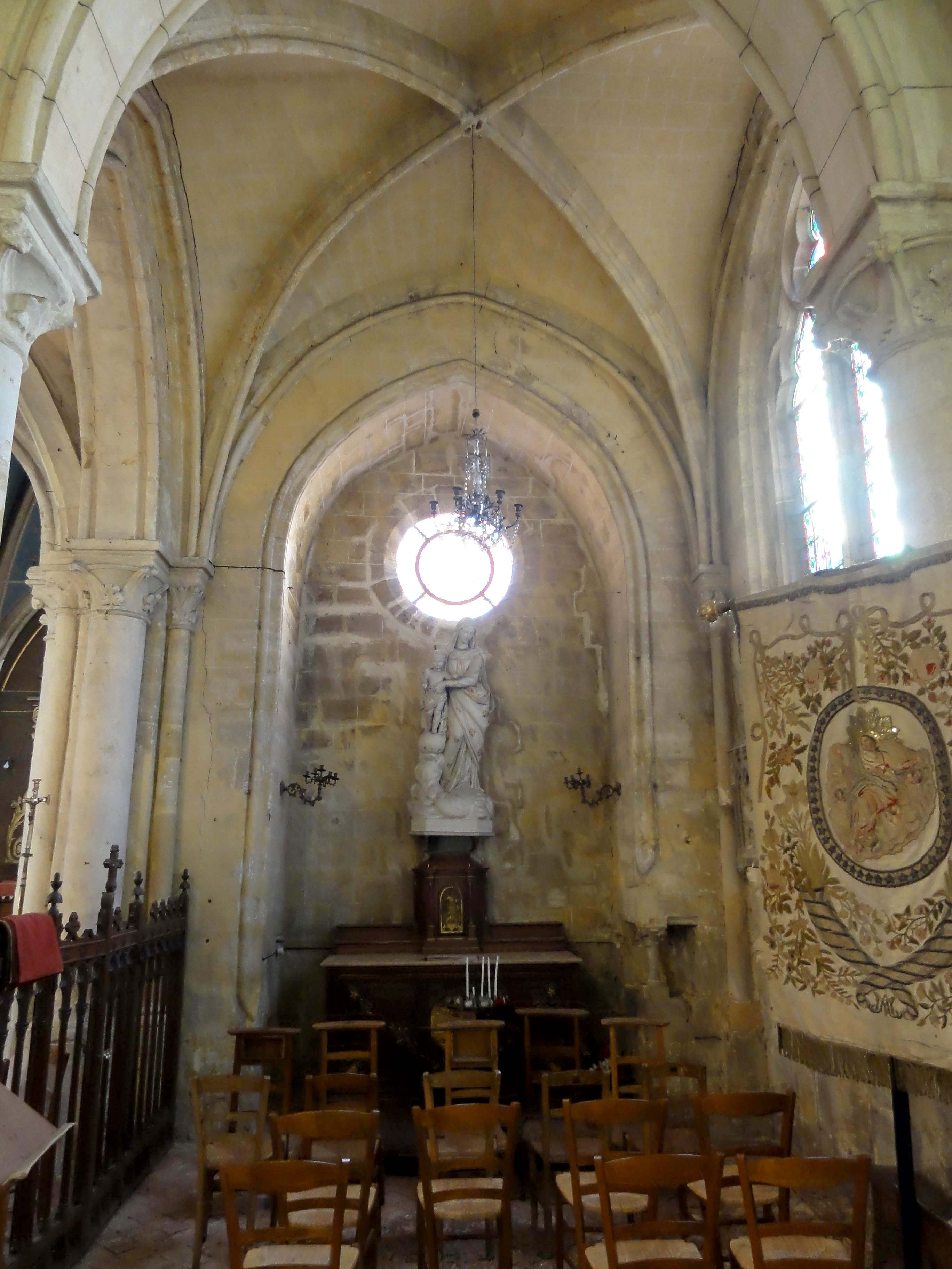 Intérieur de l'église - voir titre.